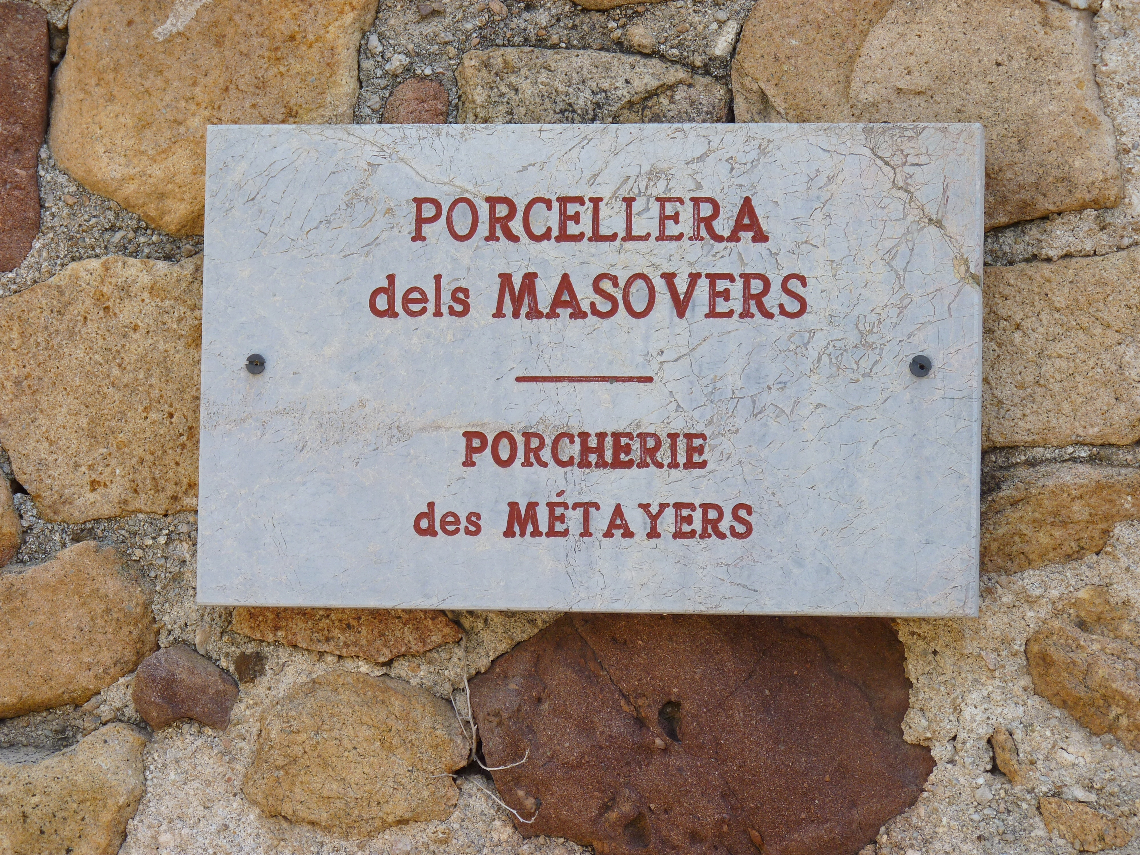 Plaque typique : Porcherie des Métayers, Coustouges (Pyrénées-Orientales, Languedoc-Roussillon, France)